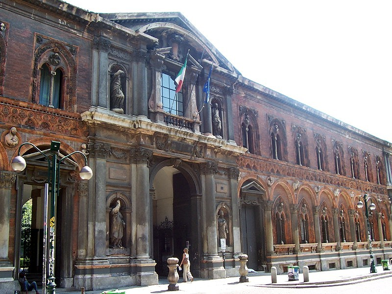 Milano - Cà Granda (Università Statale)